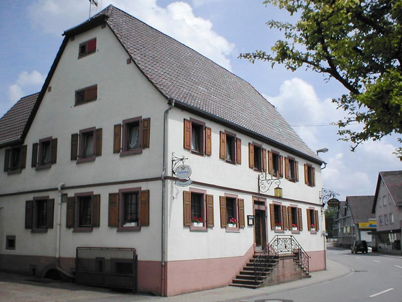 Historisches Gasthaus Drei Könige von 1780 in Aglasterhausen